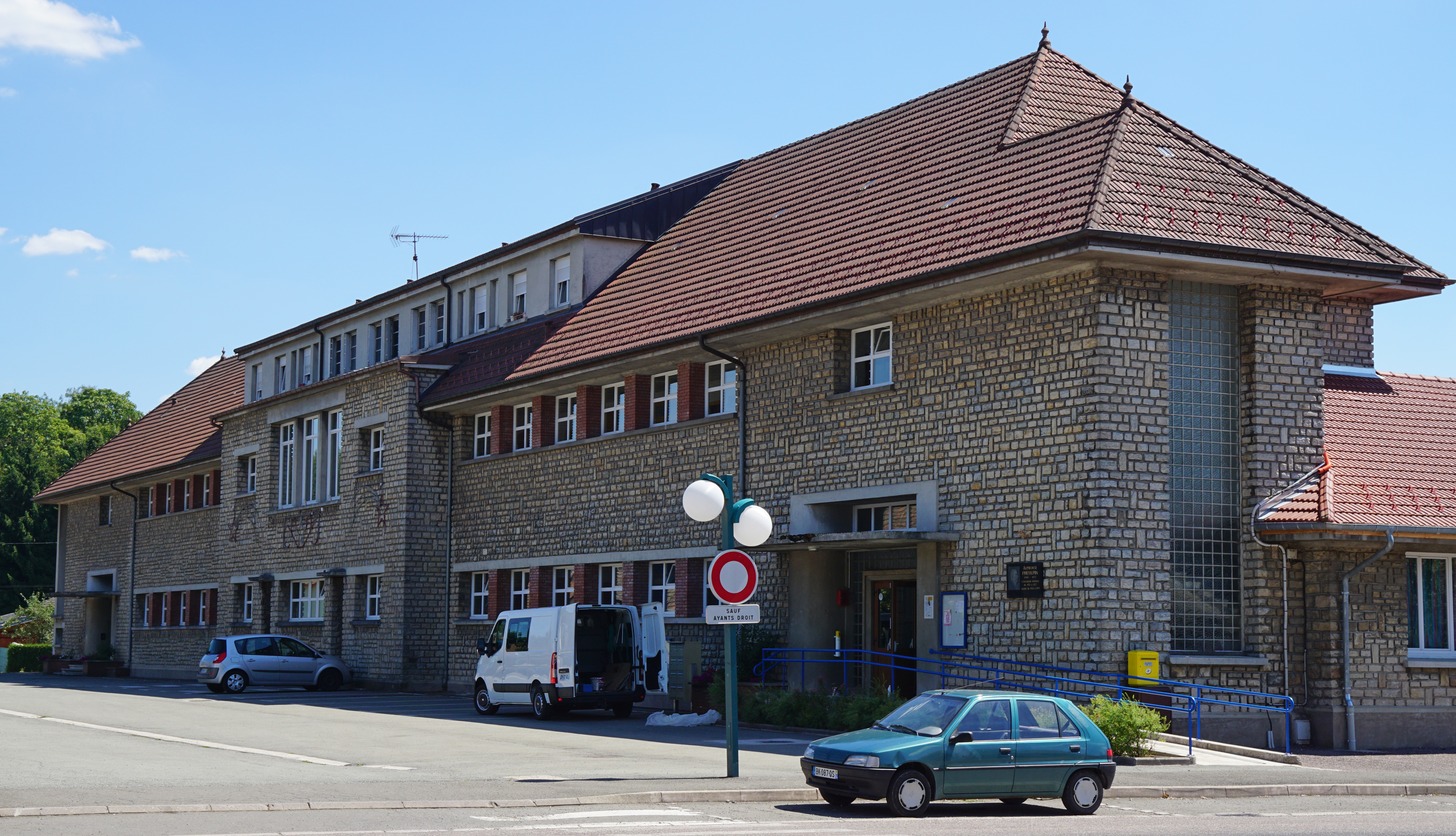 L'école de Ronchamp.